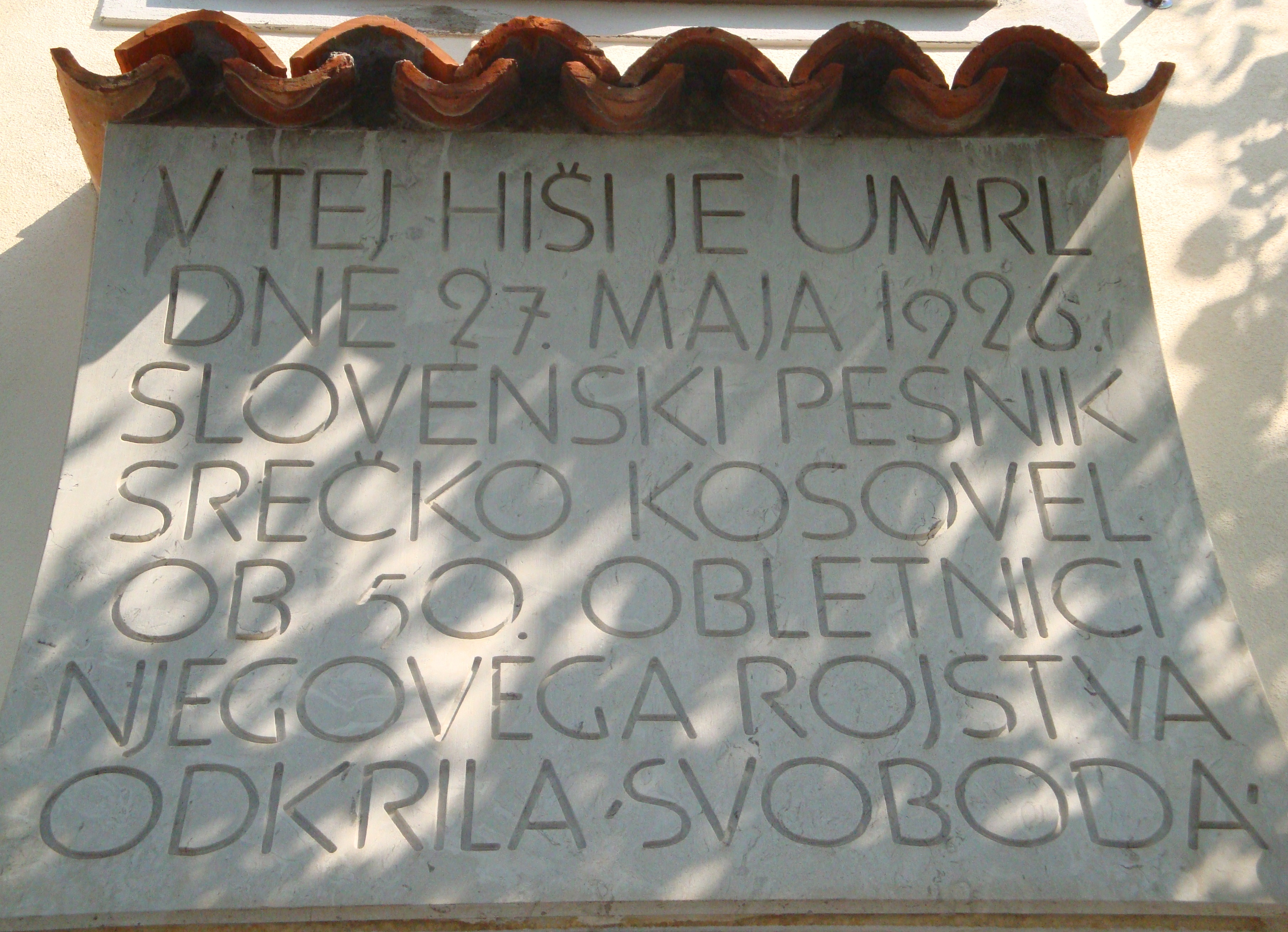 Spominska tabla na Kosovelovi domačiji v Tomaju, Slovenija